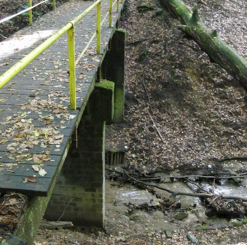 Most nad Żabińcem, Las Arkoński, Szczecin